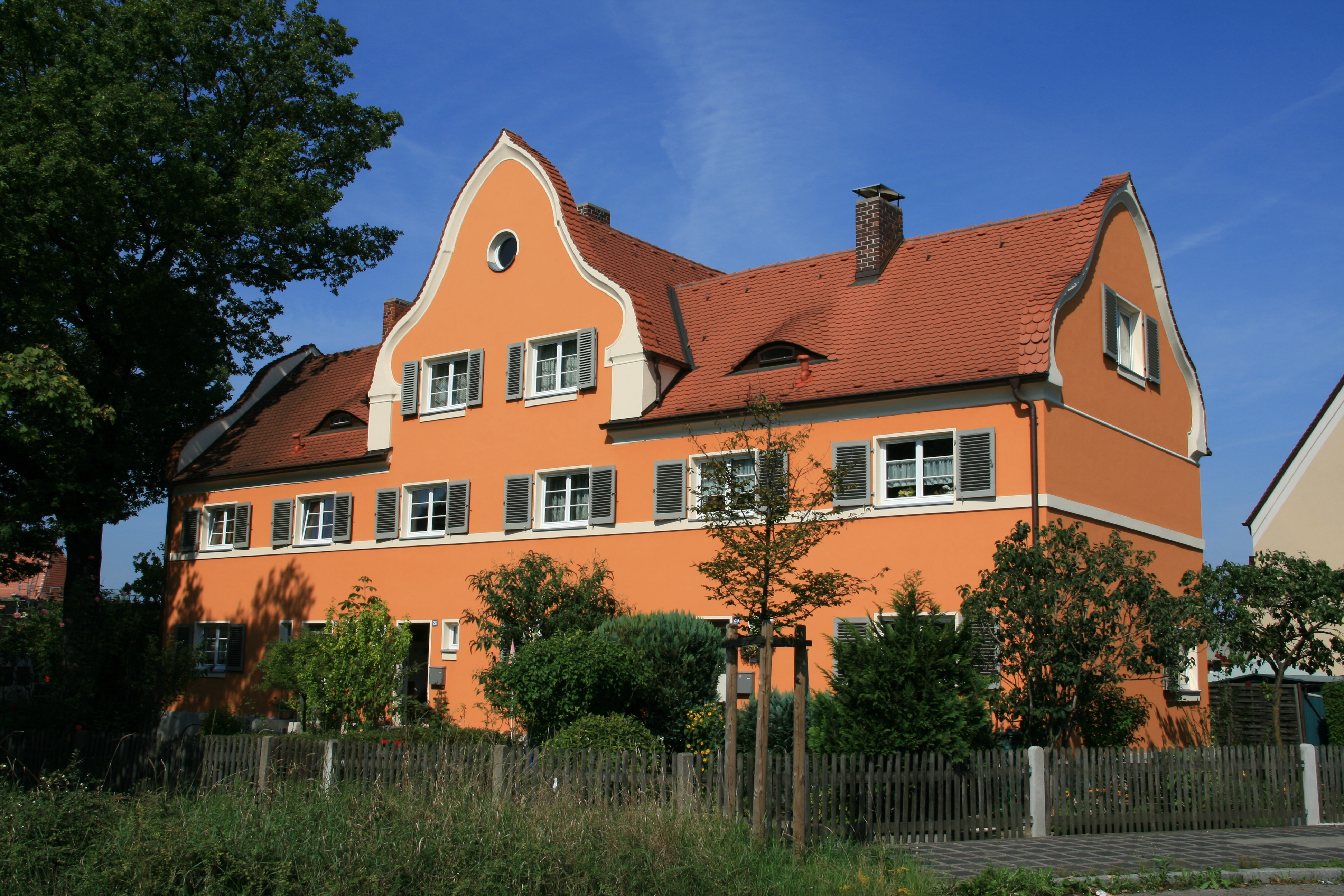 Reihenhausgruppe der Gartenstadt Nürnberg, 1911 von Richard Riemerschmid.